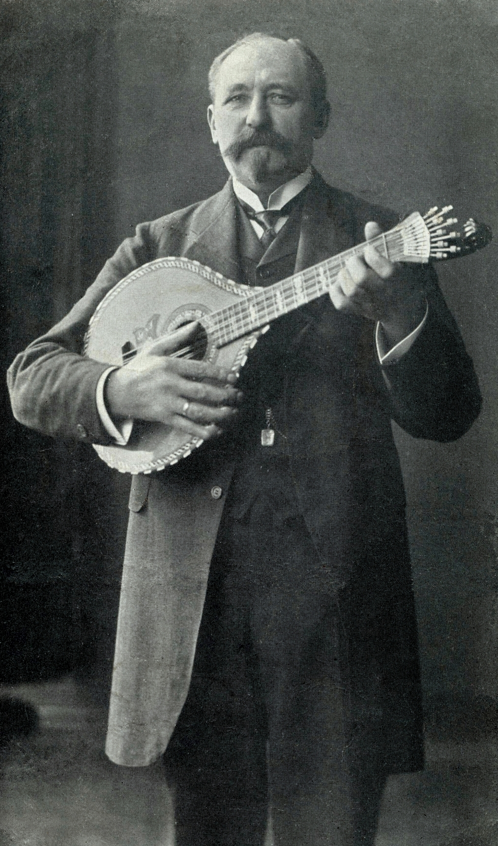 C. H. Böhm